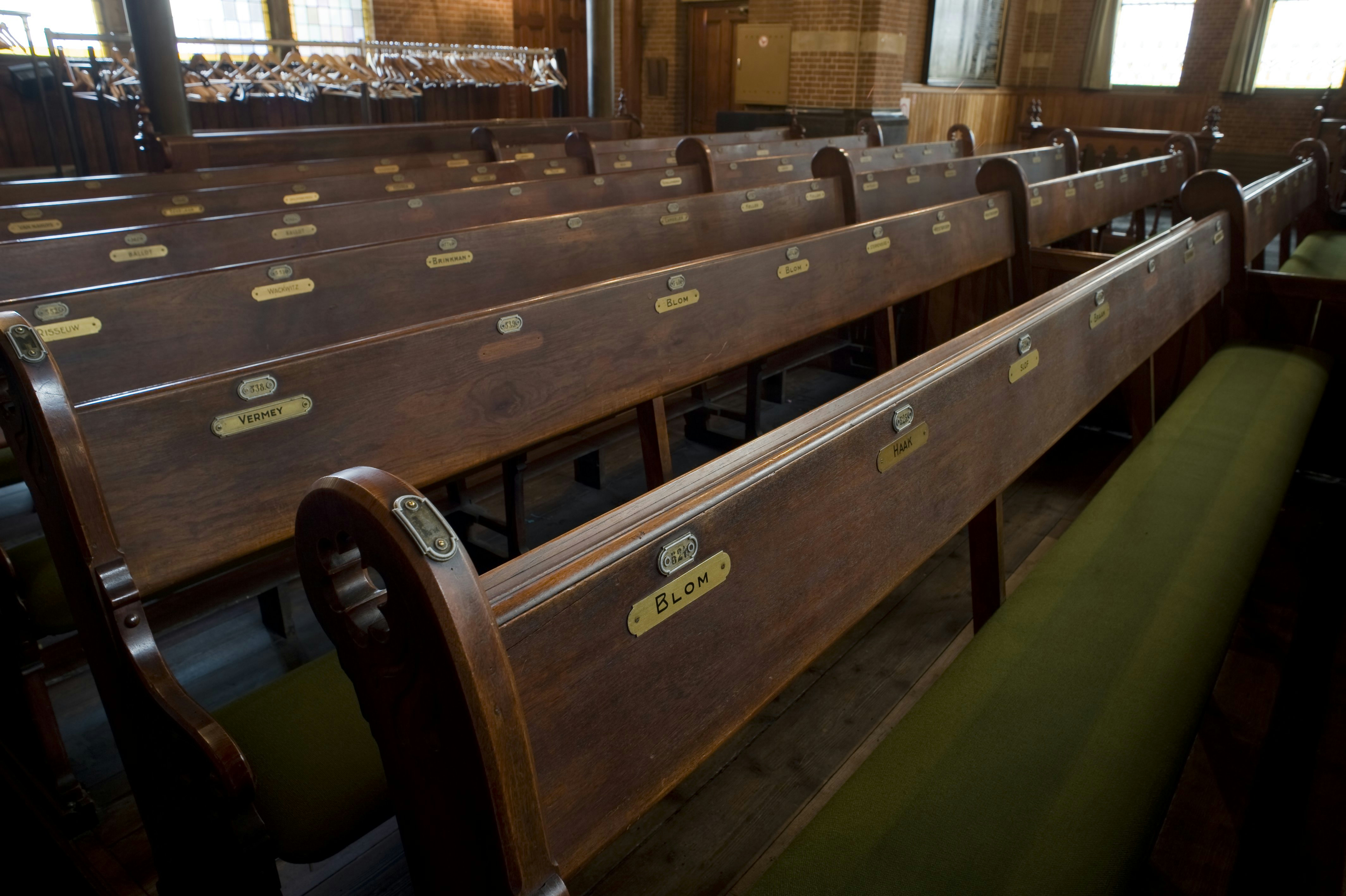 Remonstrantse Kerk: Interieur, overzicht van de kerkbanken met naamplaten